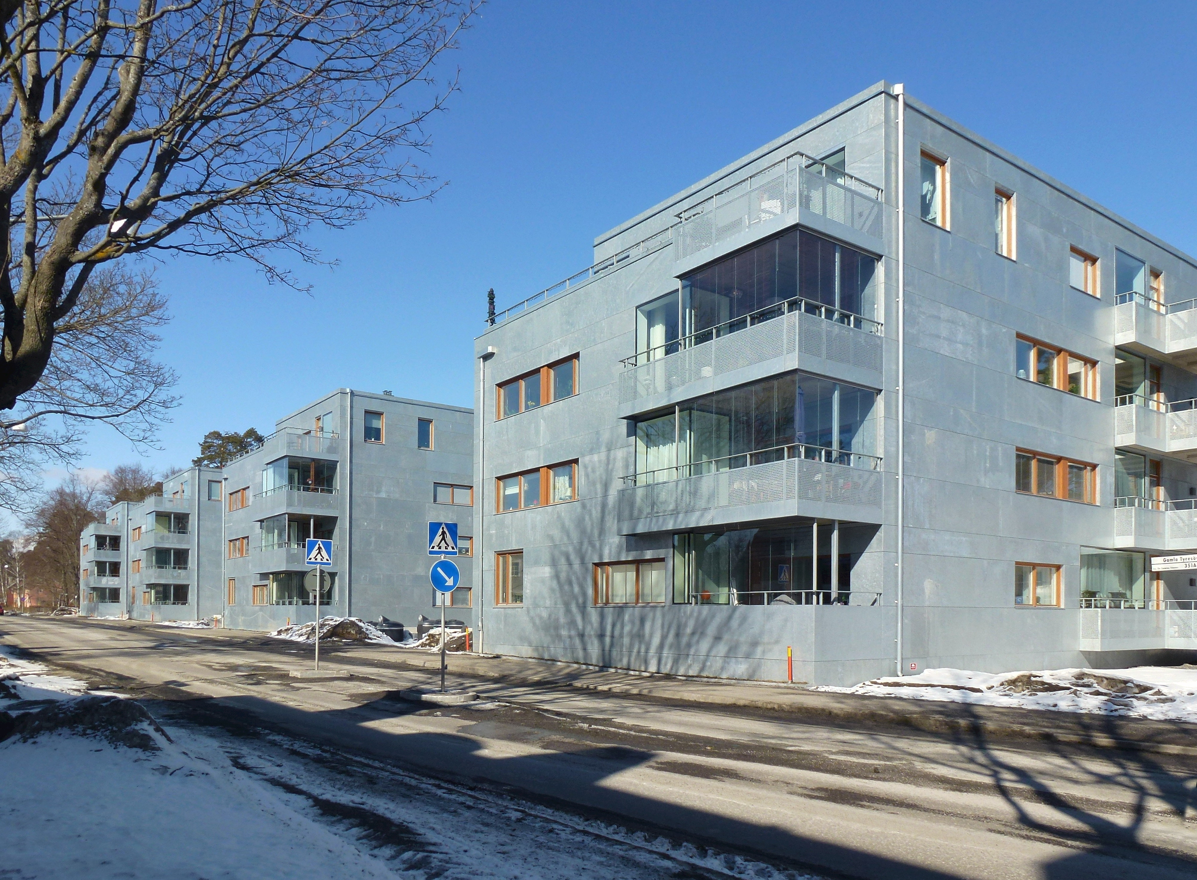 Kvarteret De gamles vänner